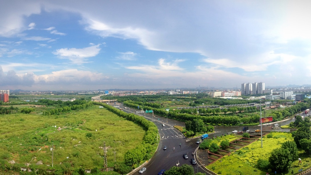 中文（中国大陆）: 番禺北斗大桥2016